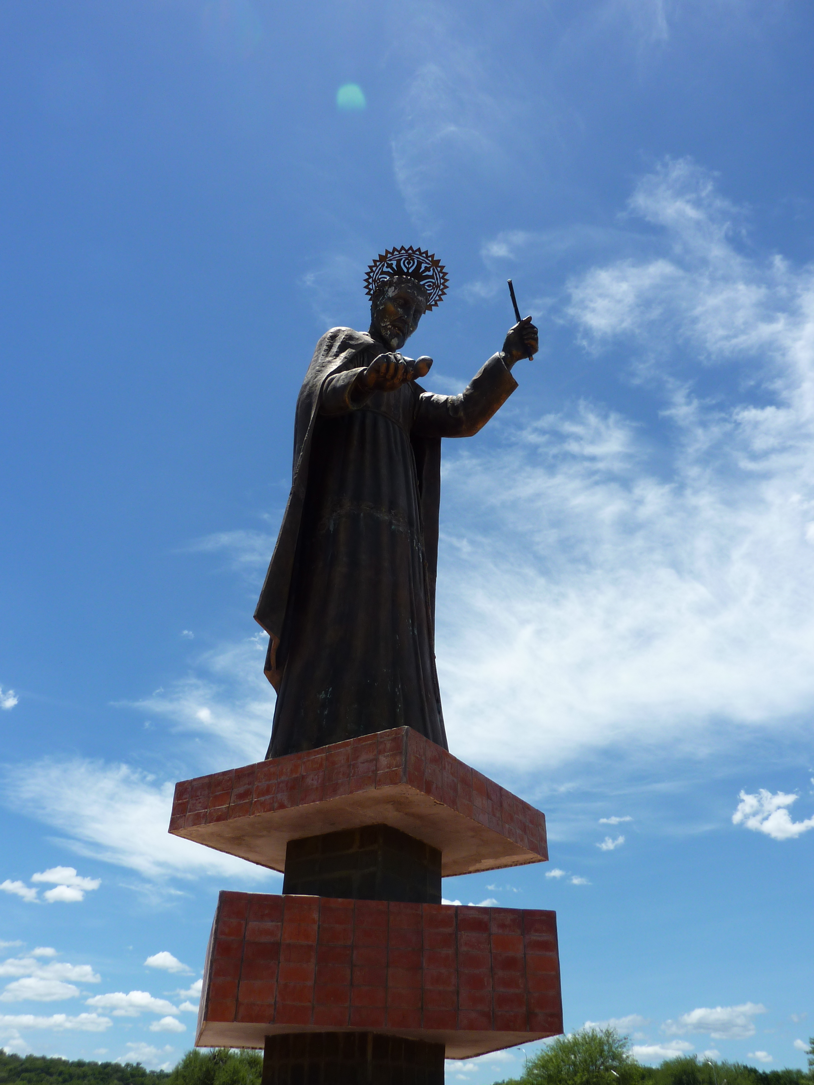 Monumento Historico San Francisco (Villamontes, Bolivia)